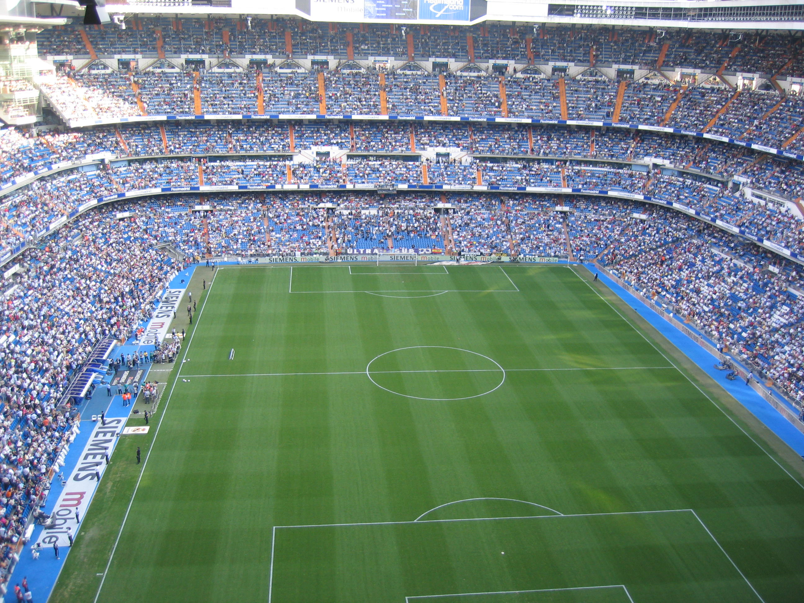 Santiago Bernabéu Stadium